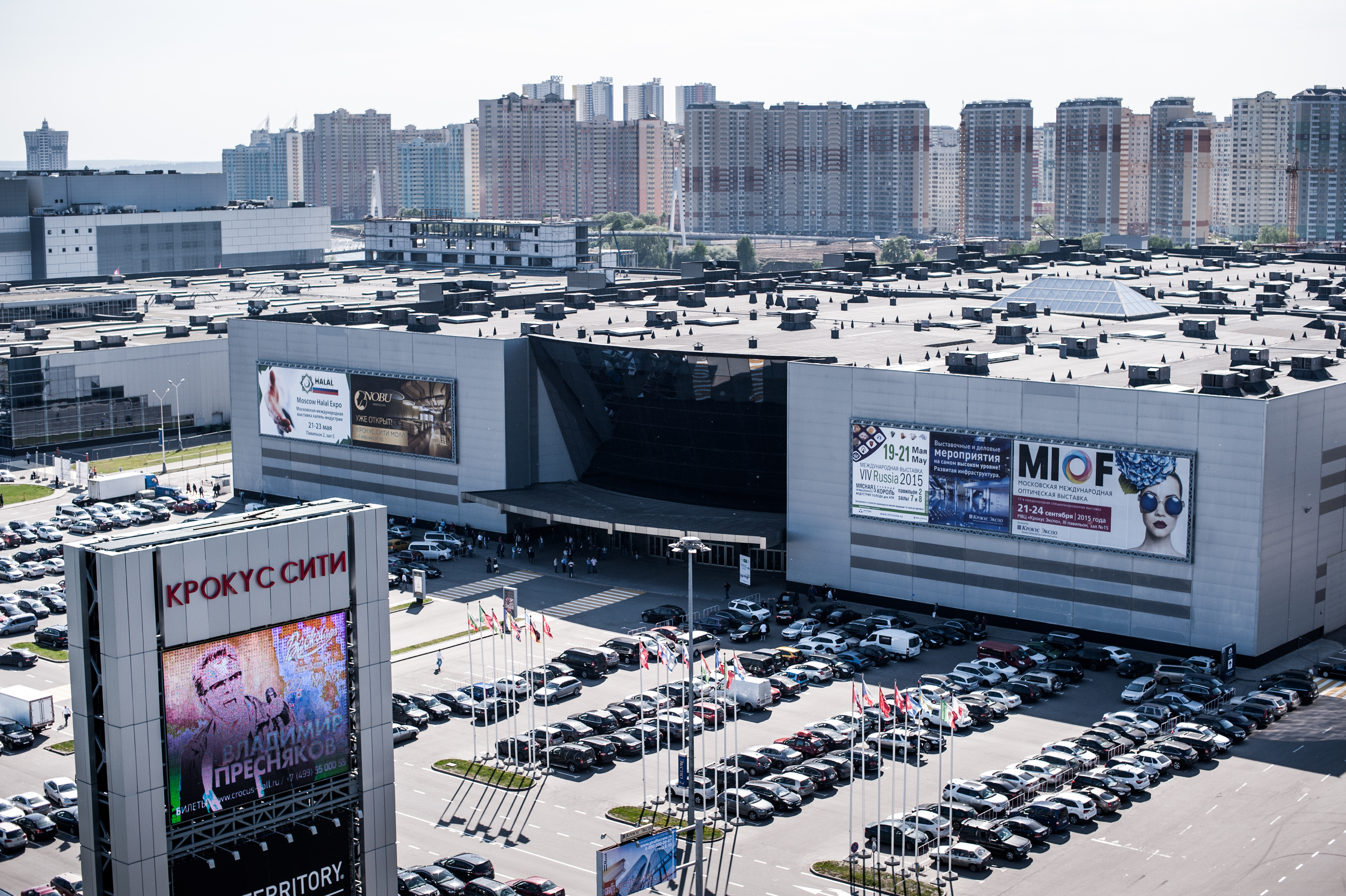 Международный выставочный центр «Крокус Экспо» – одна из самых крупных и современных выставочных площадок мира, член Всемирной ассоциации выставочной индустрии UFI в категориях «Организатор выставок» и «Выставочный центр».